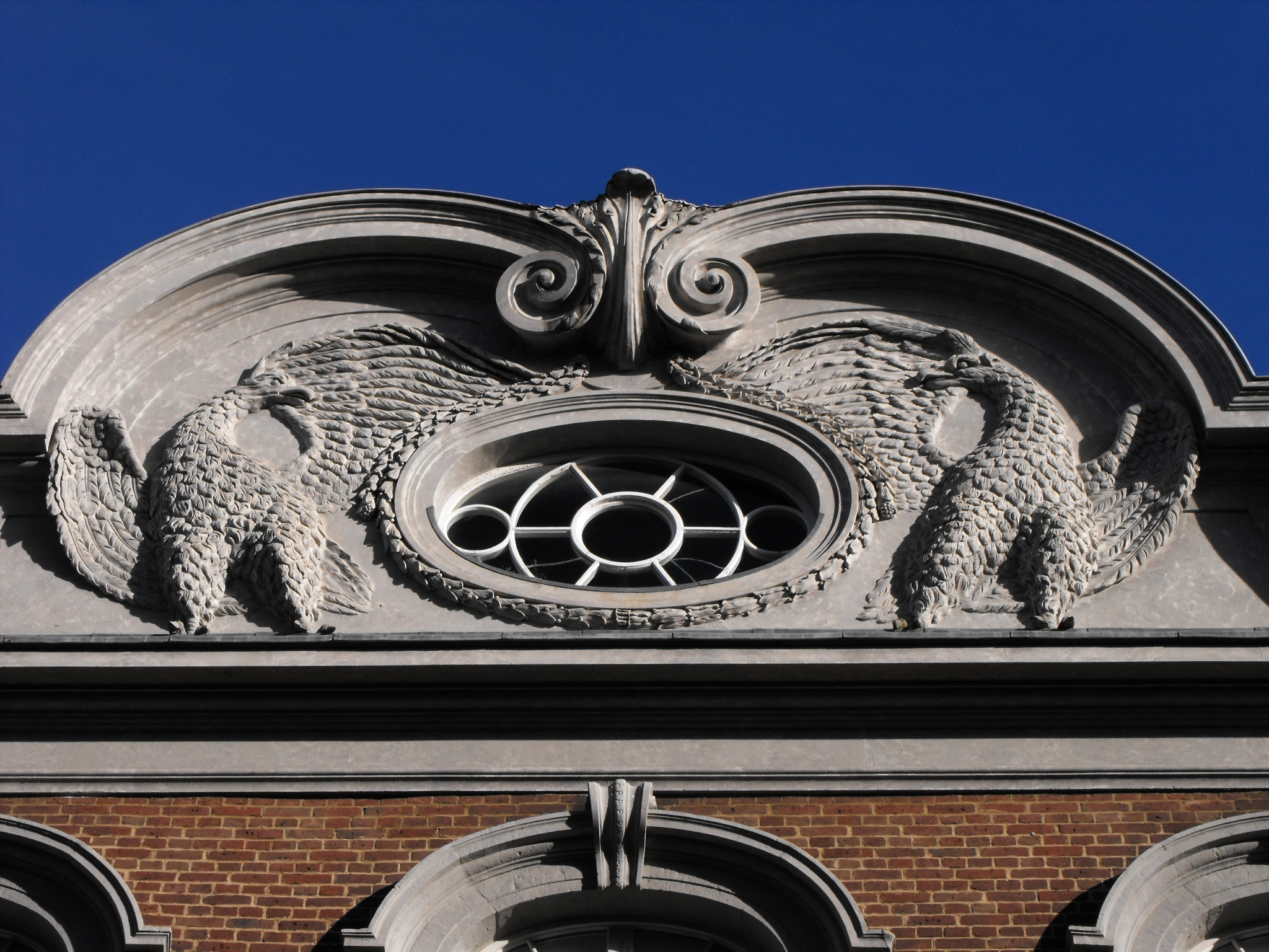 Giebel des Alten Kurhauses in Aachen; Komphausbadstraße, Architekt J.J. Couven